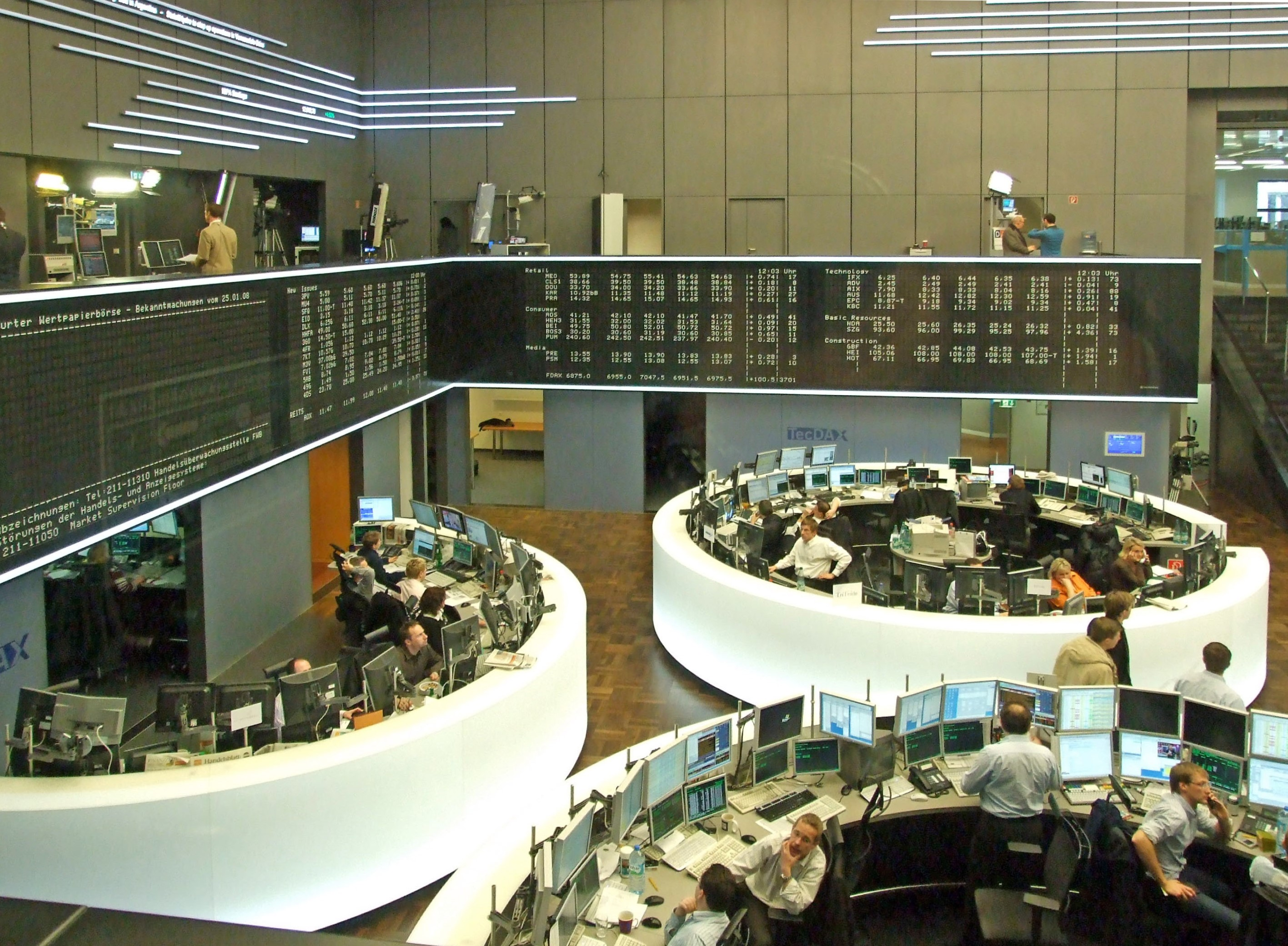 Parkett-Boerse in Ffm